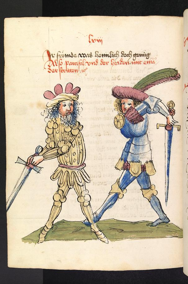 Zweikampf zwischen Parzival und dem Heiden Feirefiz. Aus: Wolfram von Eschenbach, Parzival (Handschrift), Hagenau, Werkstatt Diebold Lauber, um 1443-1446, Cod. Pal. germ. 339, I. Buch, Blatt 540v. Bildtitel: Zweikampf zwischen Parzival und dem Heiden Feirefiz Transkription Bildüberschrift: Also pacifal vnd der heiden mit eina(n)der stritten